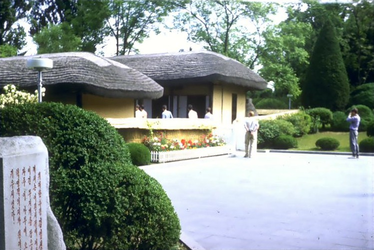 Mangyongdae, Geburtsort von Kim Il Sung in Nordkorea 1989